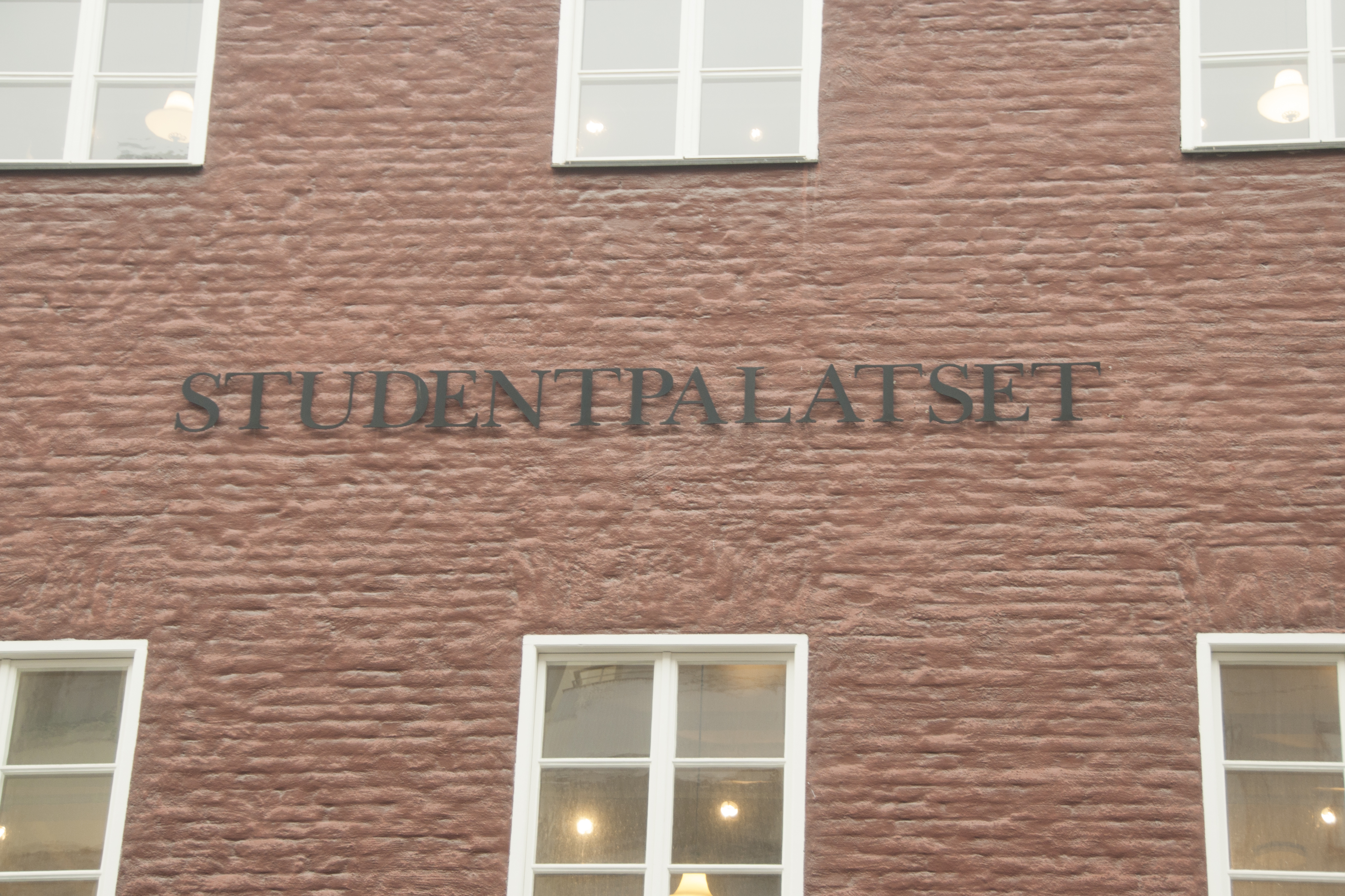 Studentpalatset, uppfört för Stockholms högskolas juridiska och humanistiska fakultet År 1926 - 1927 Nybyggnad Axel Holmgren (Byggmästare) Erik Lallerstedt (Arkitekt) Stockholms Högskola (Byggherre)